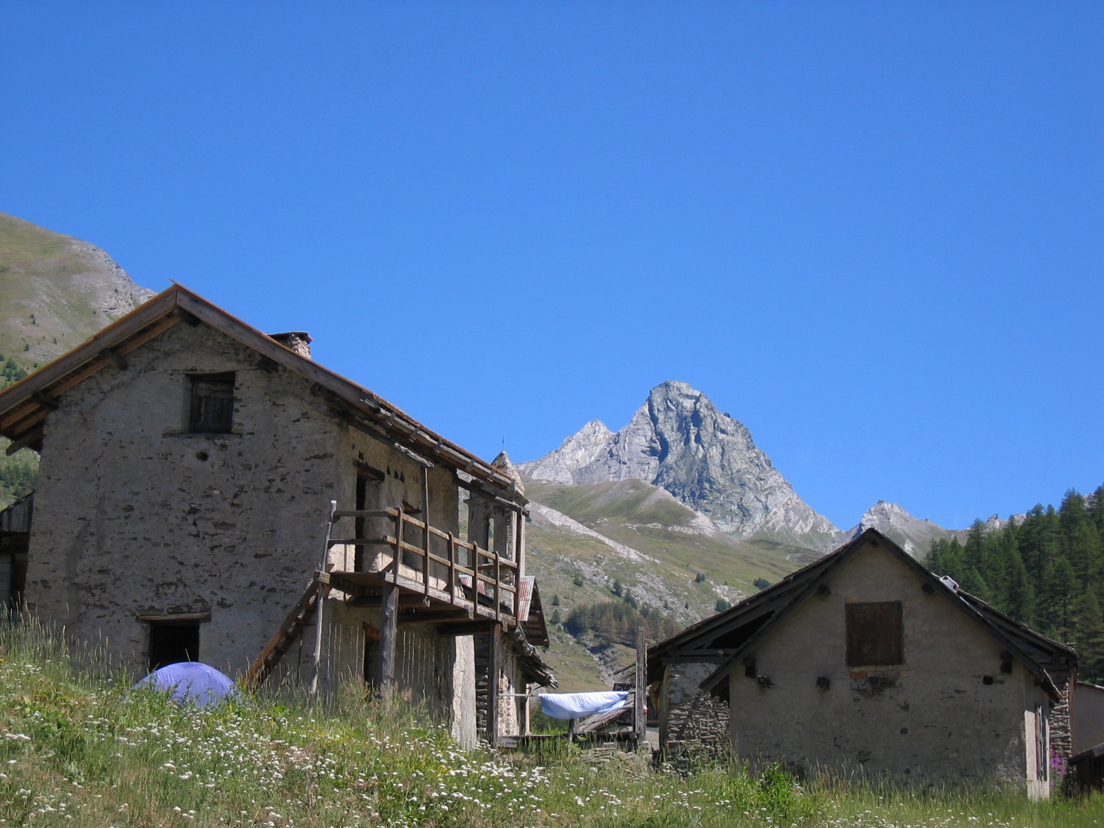 Valpréveyre, Queyras, Hautes-Alpes, France